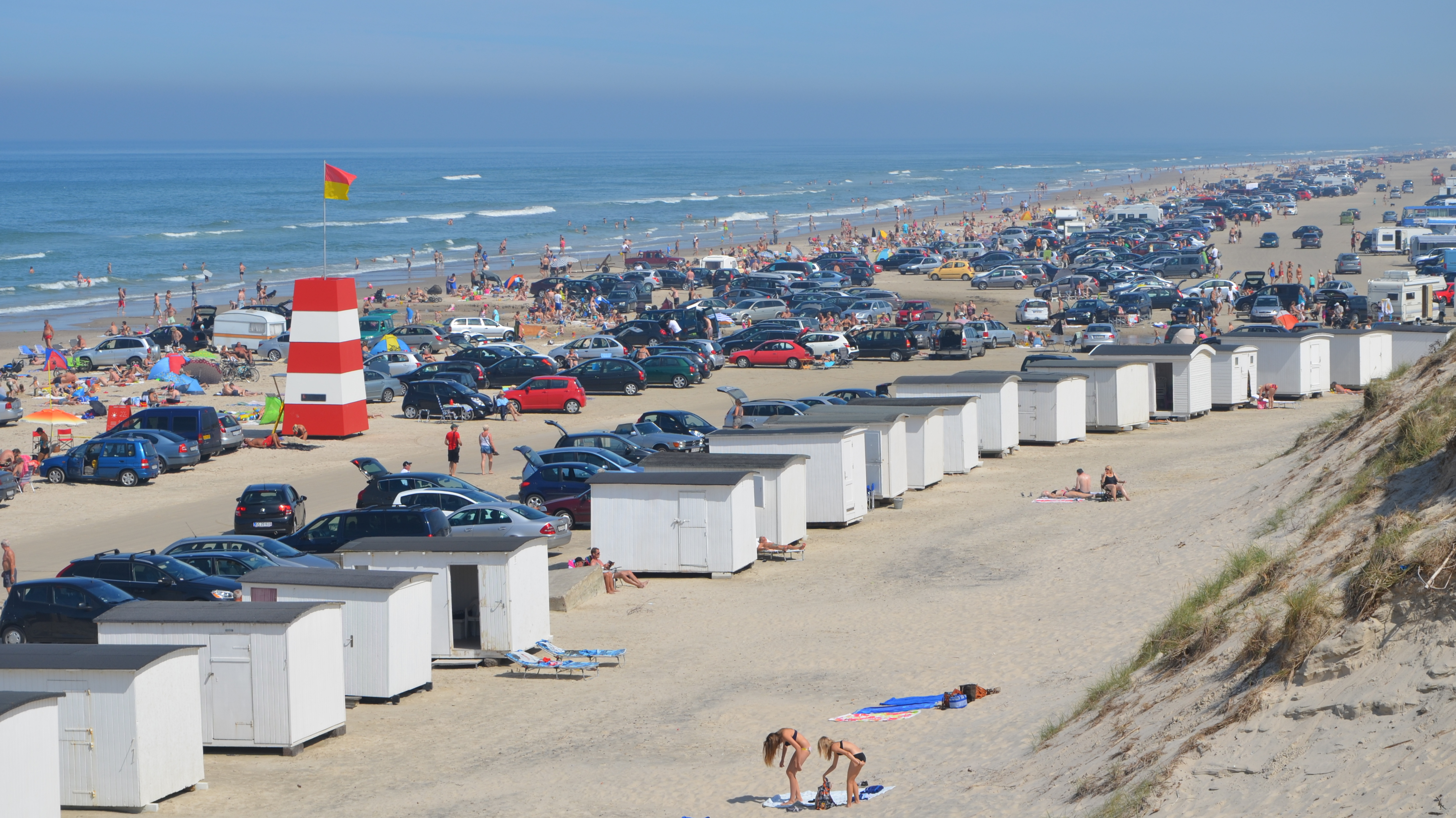 På en sommerdag